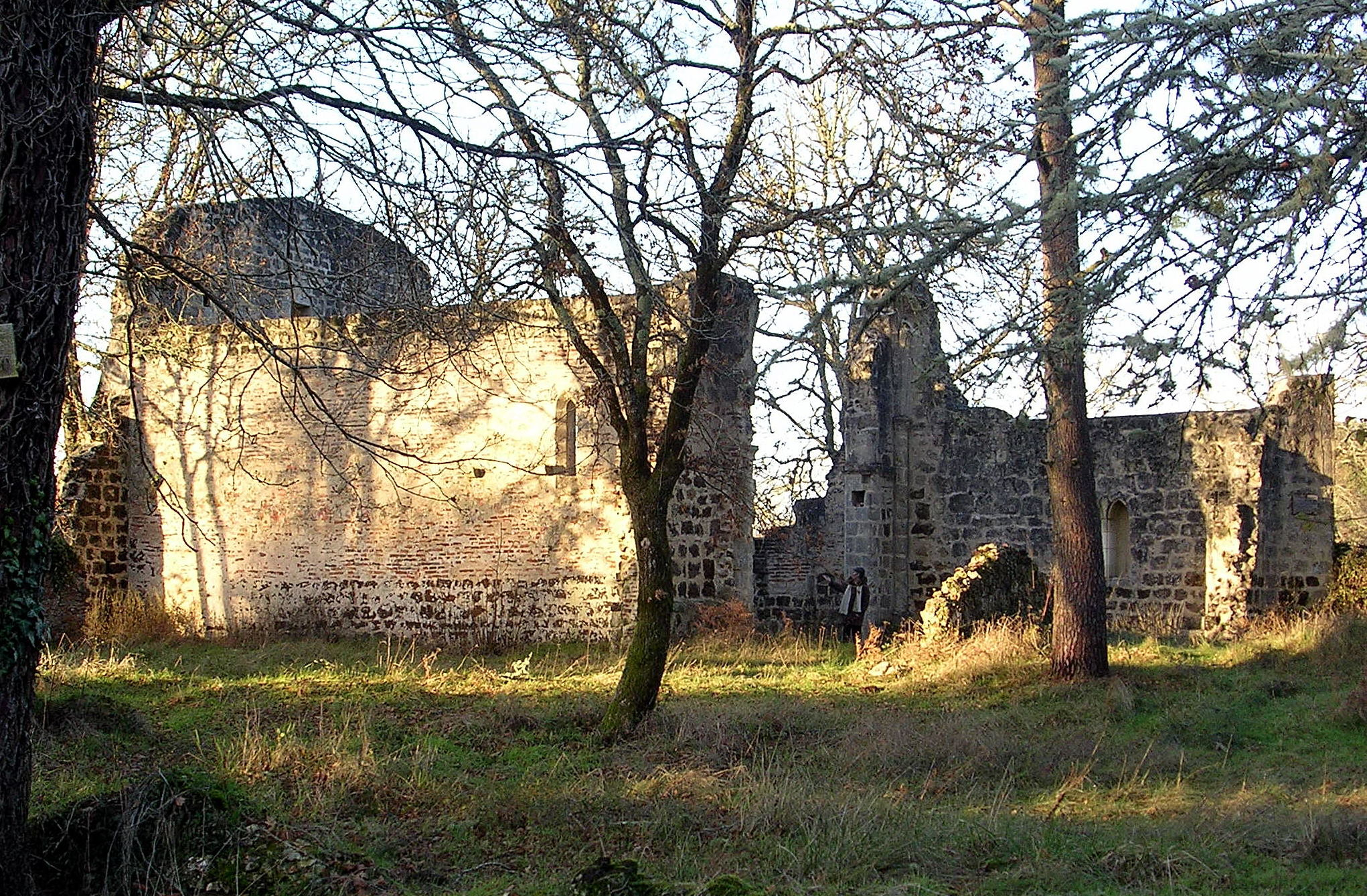 Commanderie de Bessaut à Lencouacq, France. Photo prise par Jibi44 en décembre 2004.